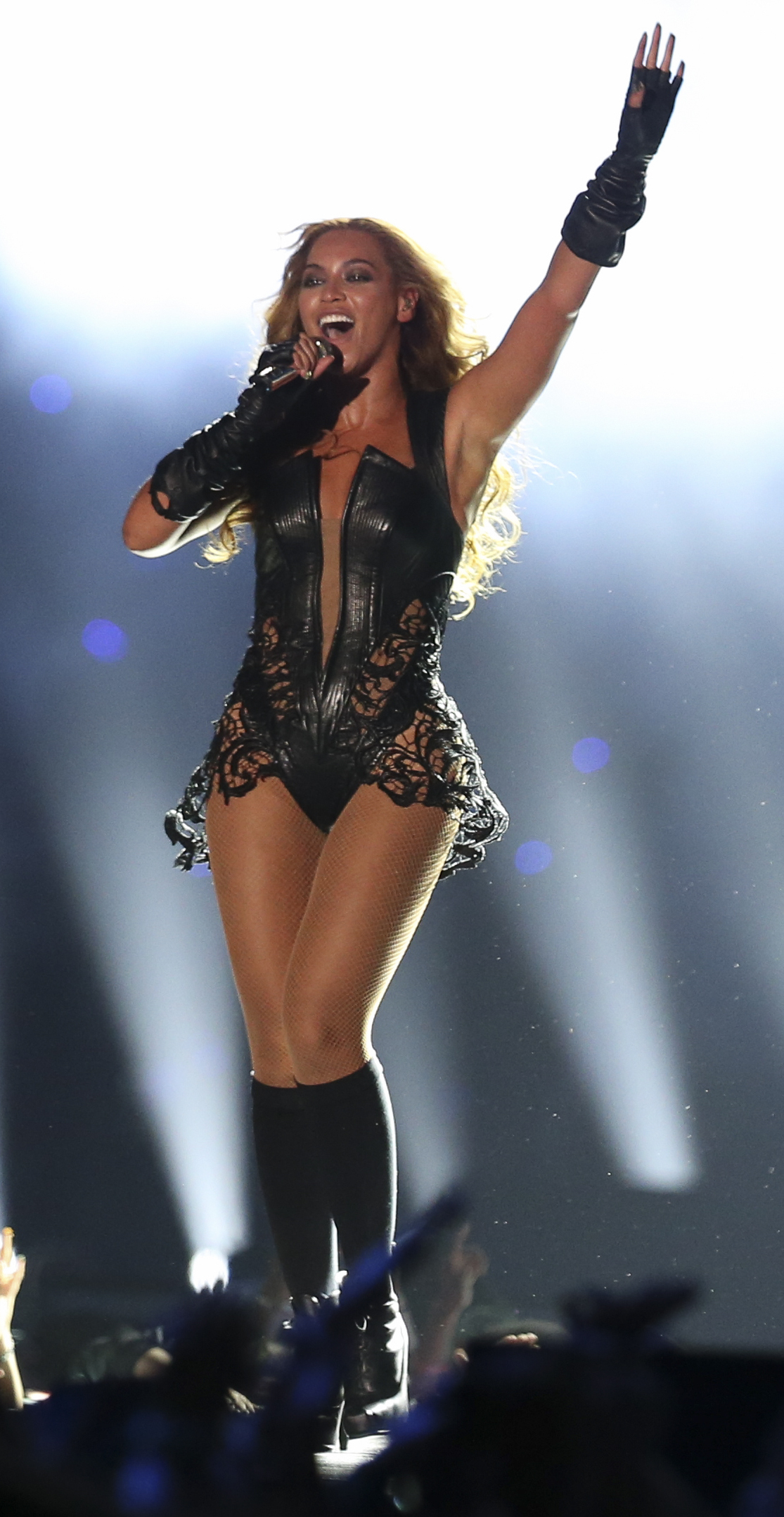 DW2Q0758